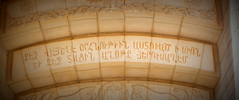 երուսաղեմի ժառանգավորաց վարժարան